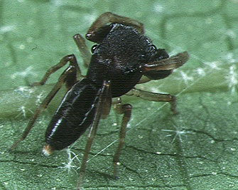 male Synagelides annae from Okinawa.